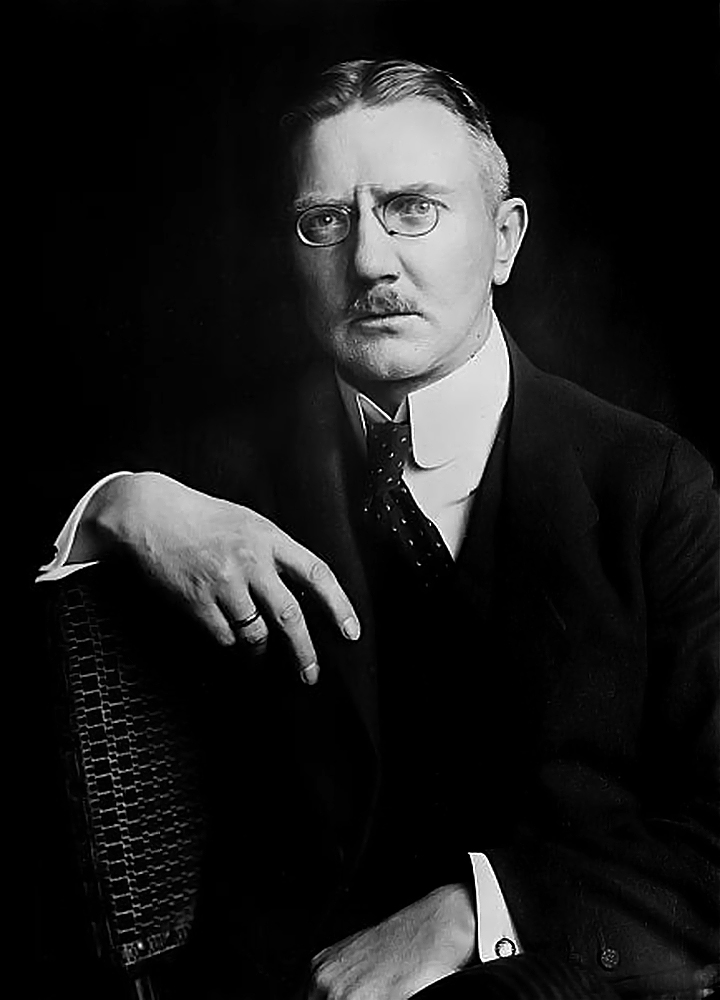 Hjalmar Schacht (1877 – 1970), President of the Reichsbank